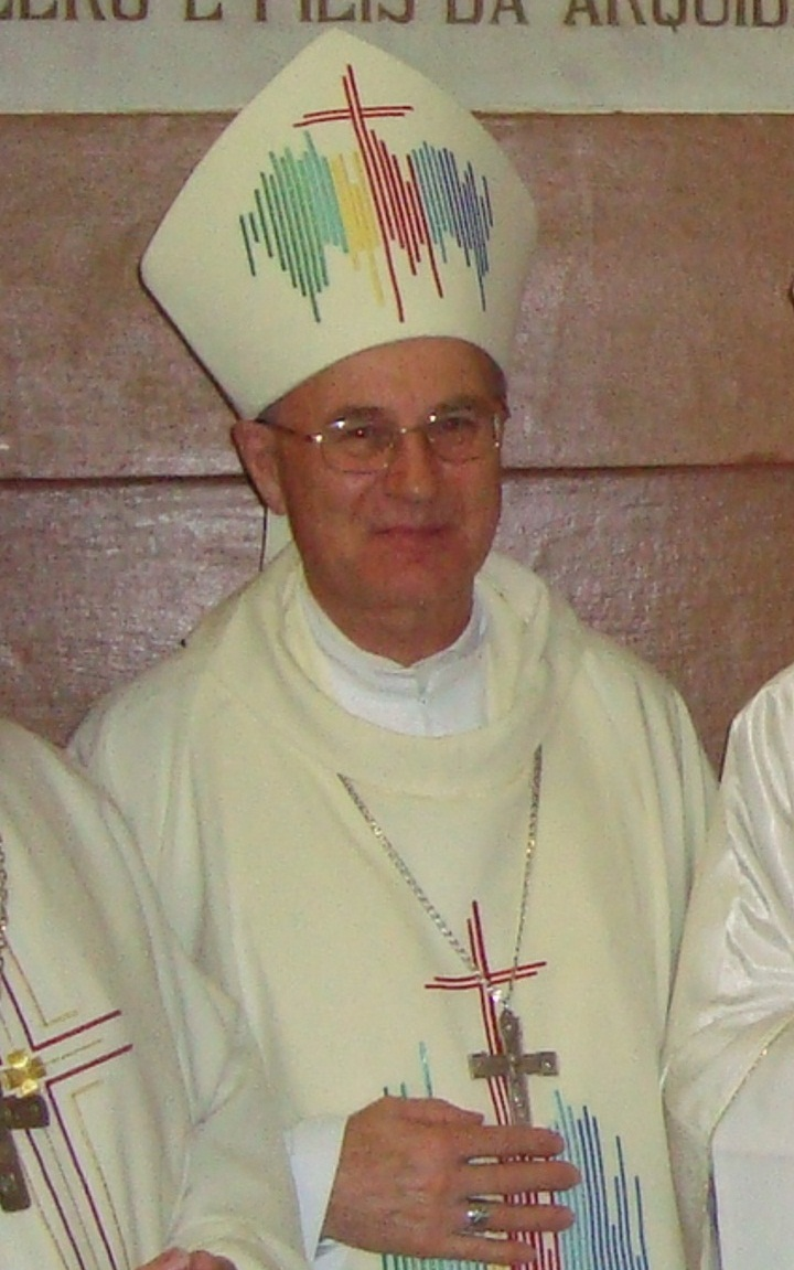 Dom Hélio Adelar Rubert, Arcebispo de Santa Maria, Brasil.